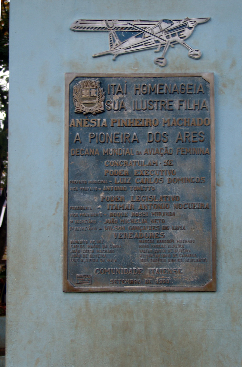 Placa comemorativa de Anésia Pinheiro Machado. Primeira mulher a se habilitar e a trabalhar como aviadora no Brasil. Filha de Itaí e Orgulho da população itaiense